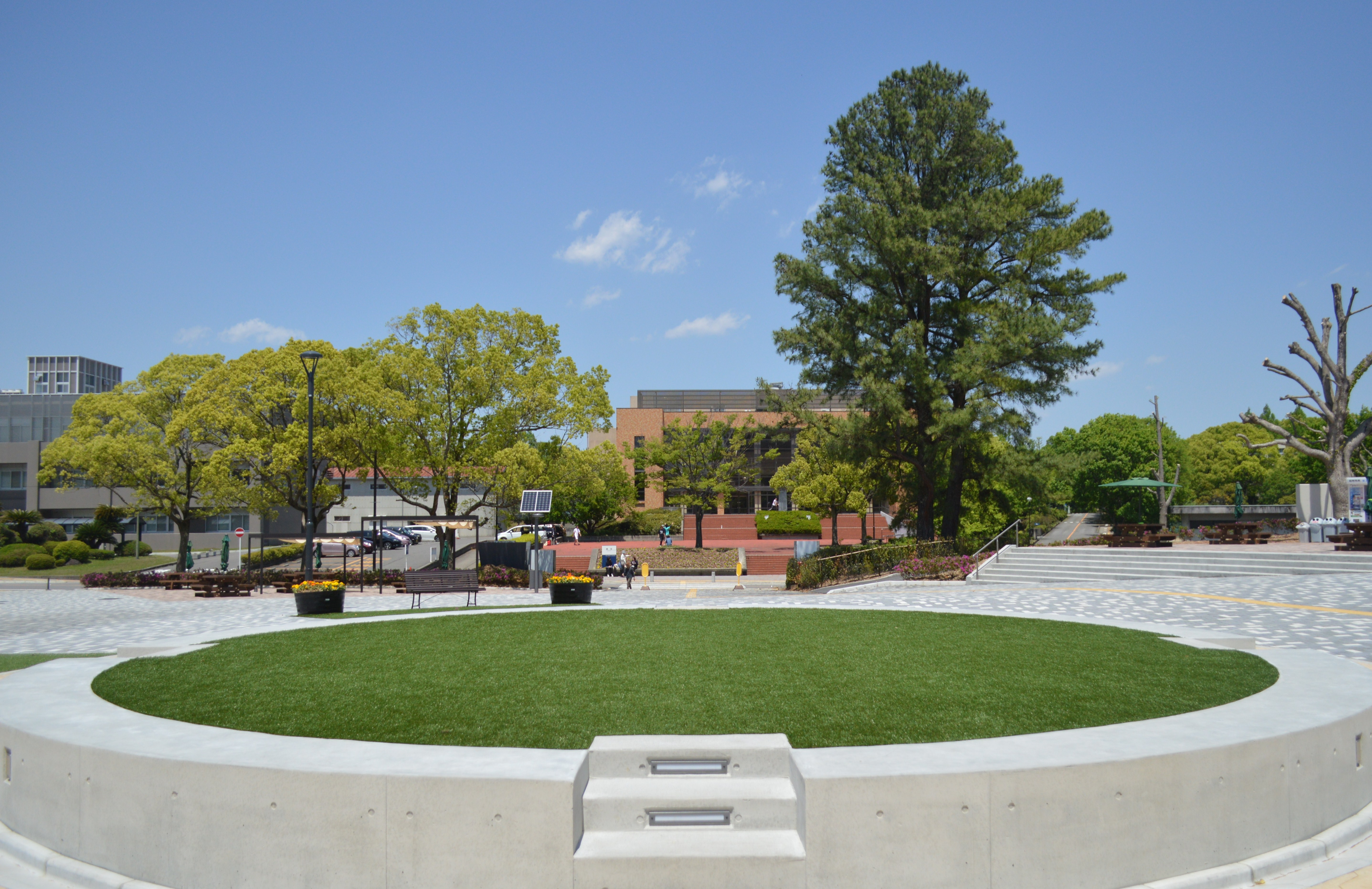 愛知教育大学 奥の茶色い建物は講堂